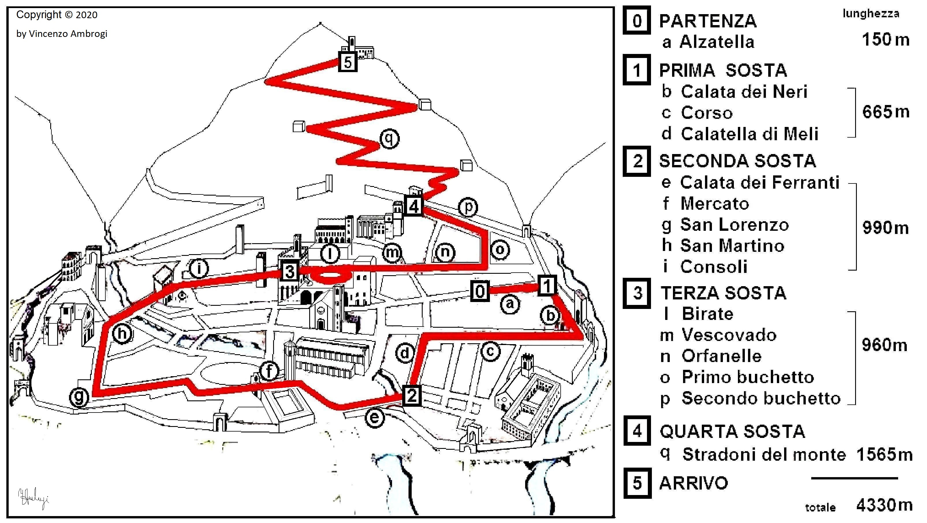 Pianta della Corsa dei Ceri completa di misure totali e parziali e dei punti più importanti.